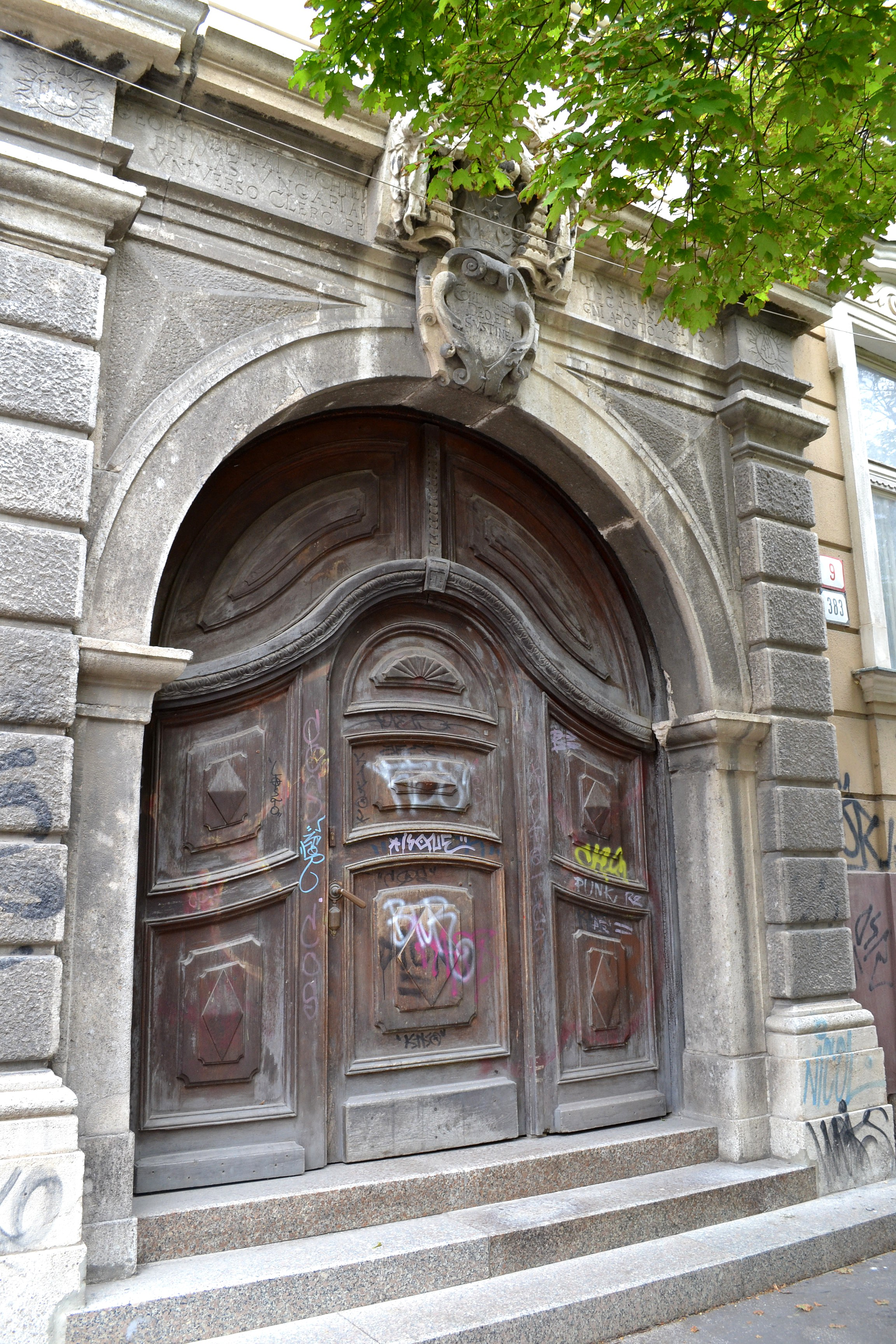 Trnava, komplex univerzitných budov; budova Generálneho seminára; portál budovy